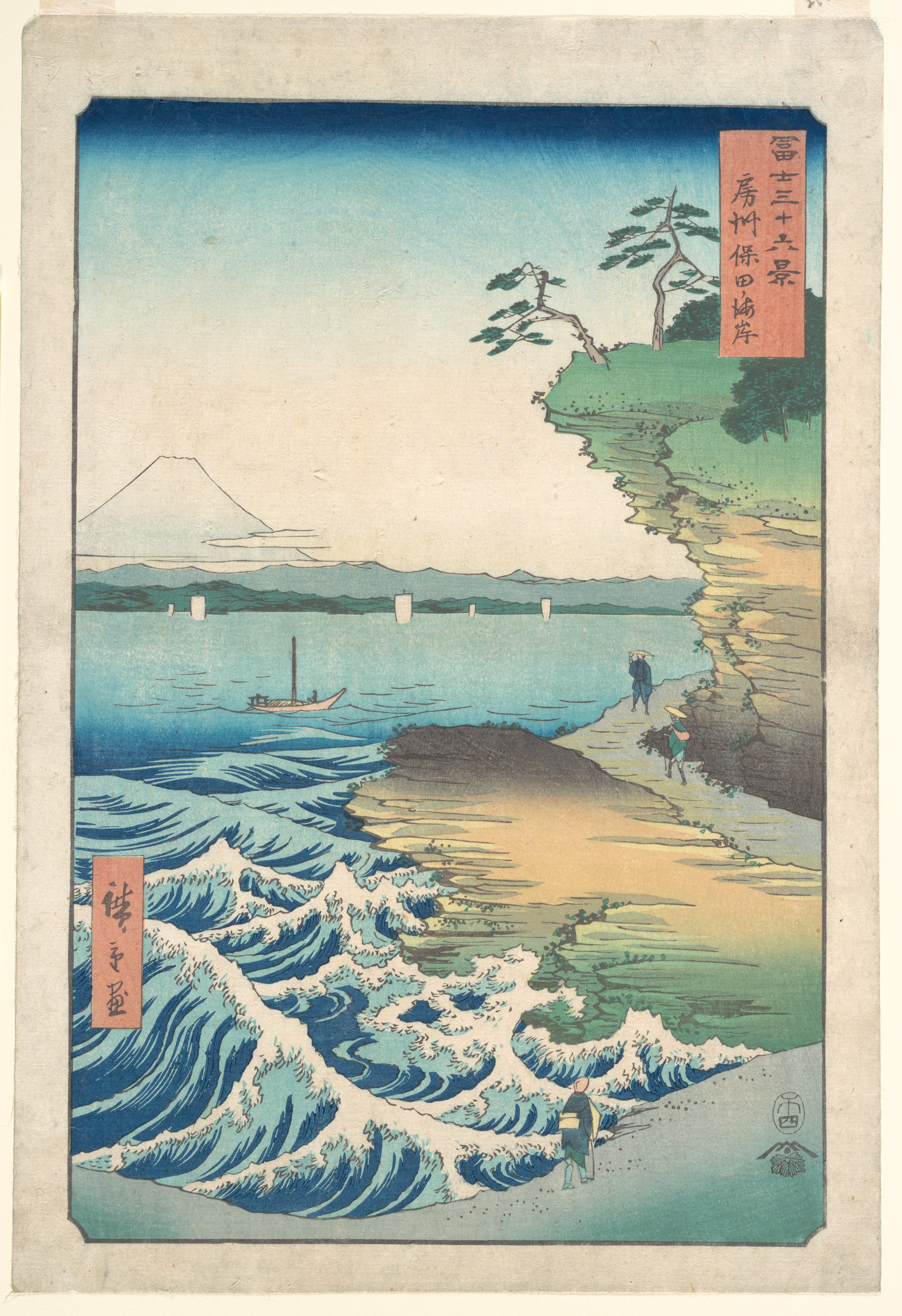 Japan; Print; Prints